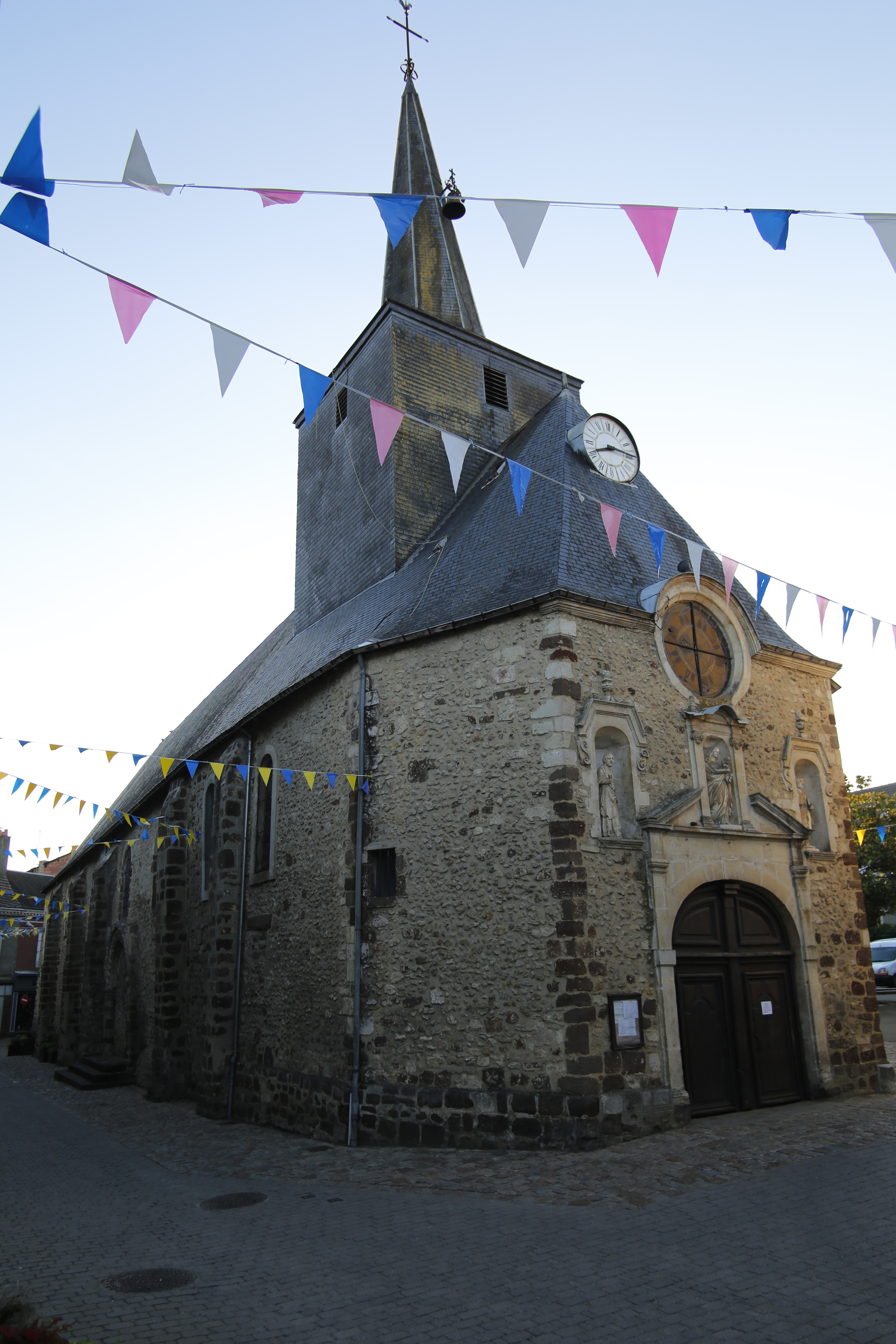 Église Notre-Dame de Beaumont-sur-Sarthe : porche est. .